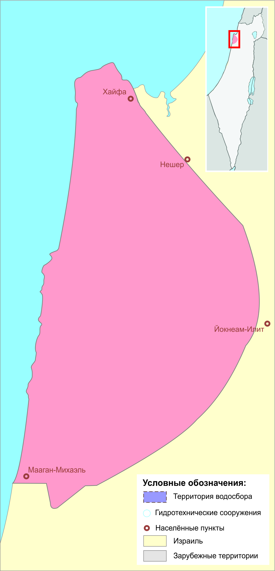 Карта водосборного бассейна Кармель / водные ресурсы государства Израиль